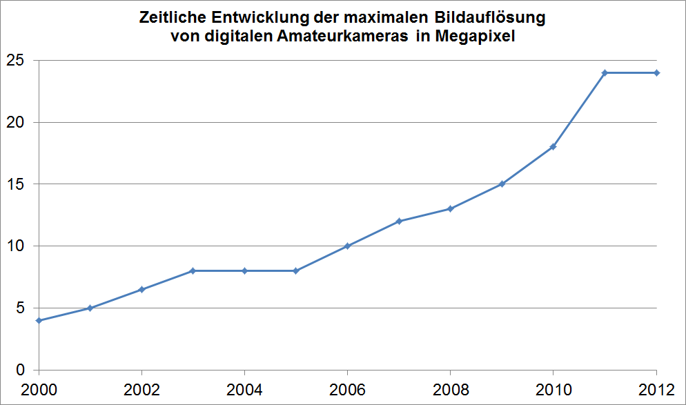 Entwicklung der maximalen Pixelzahlen von digitalen Amatuerkameras zwischen 2000 und 2012